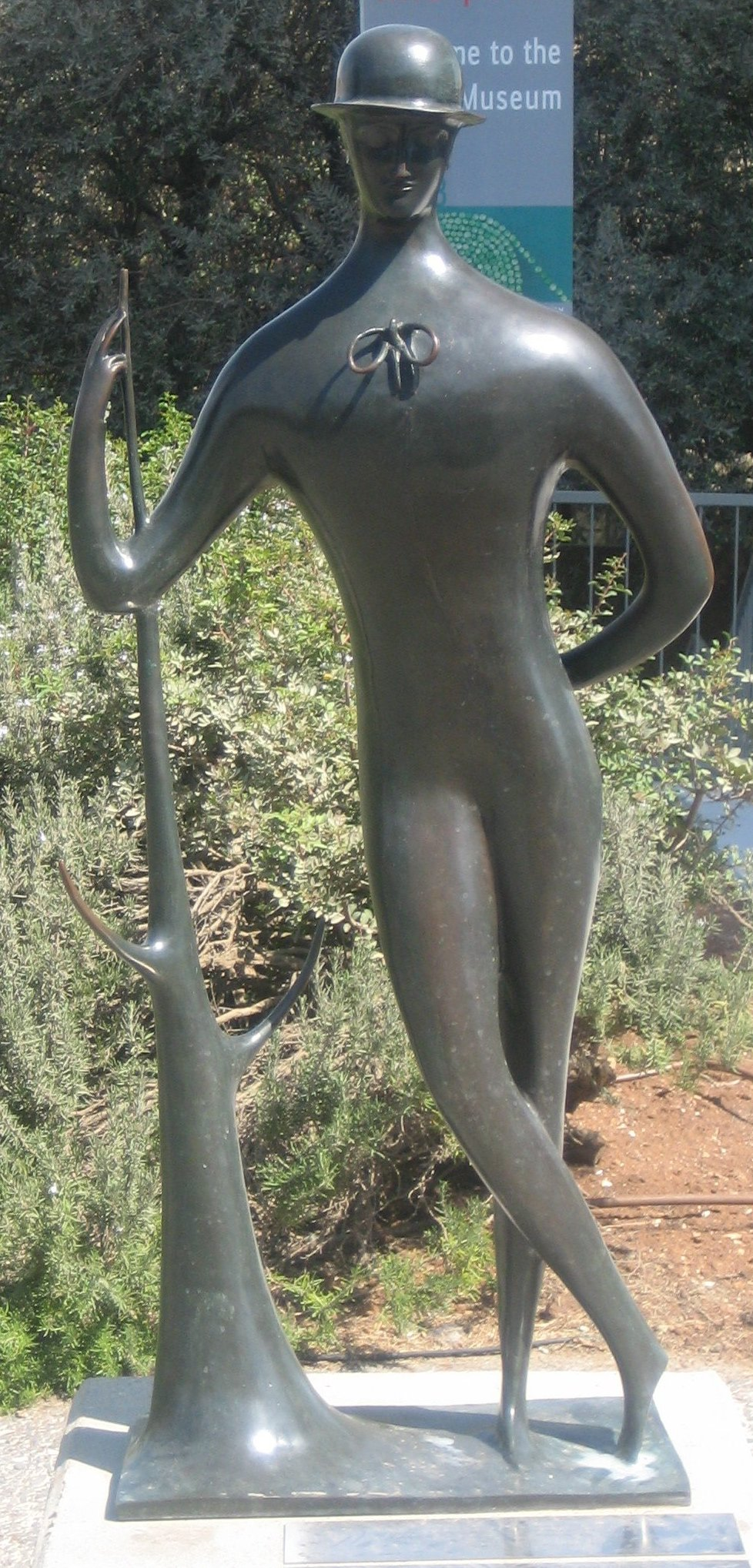 Sculpture